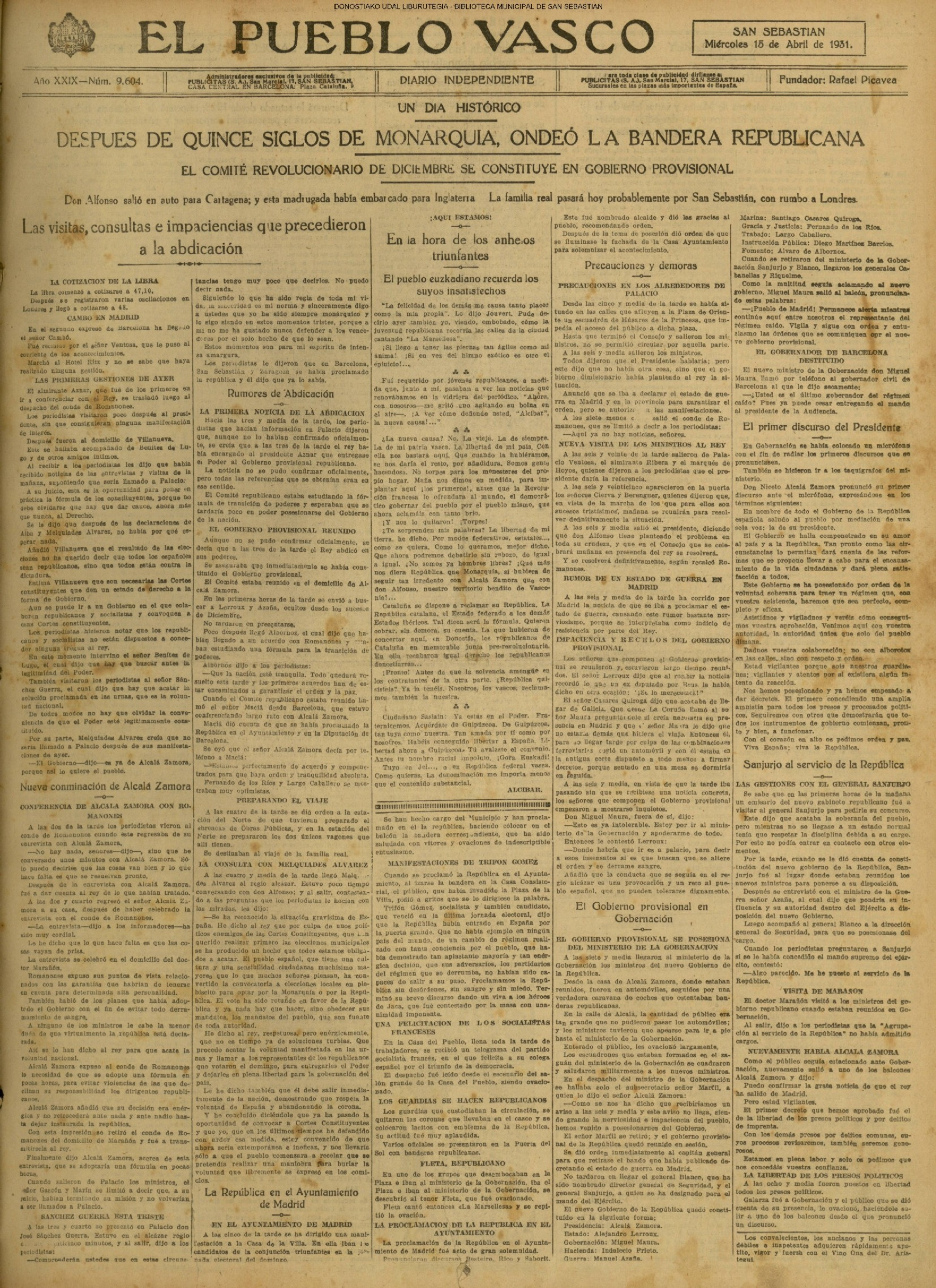 El Pueblo Vasco egunkaria Donostian argitaratu zen 1903tik 1936ra.